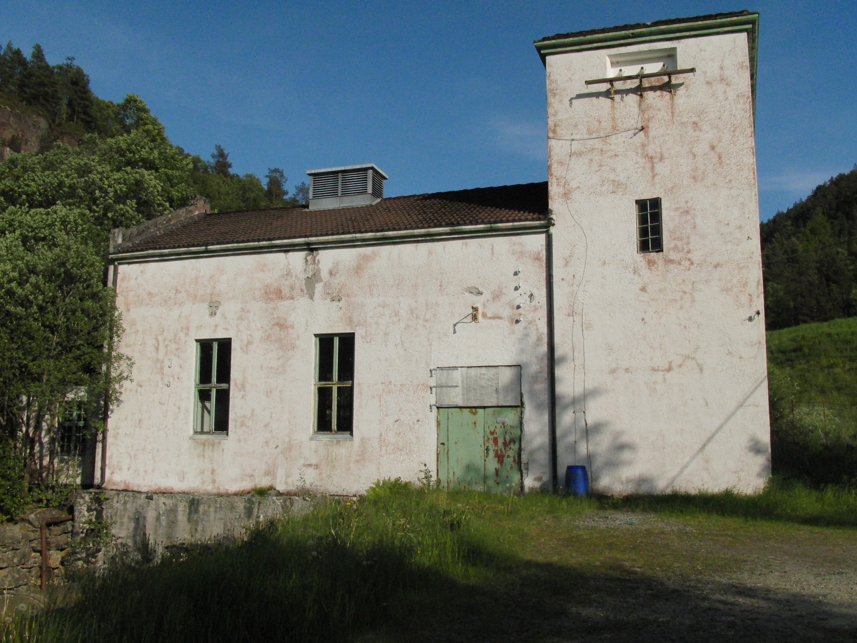 Tøsse gamle kraftverk